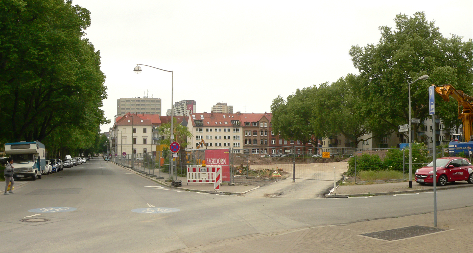 Bauarbeiten auf dem Leergrundstück in der Adolfstraße